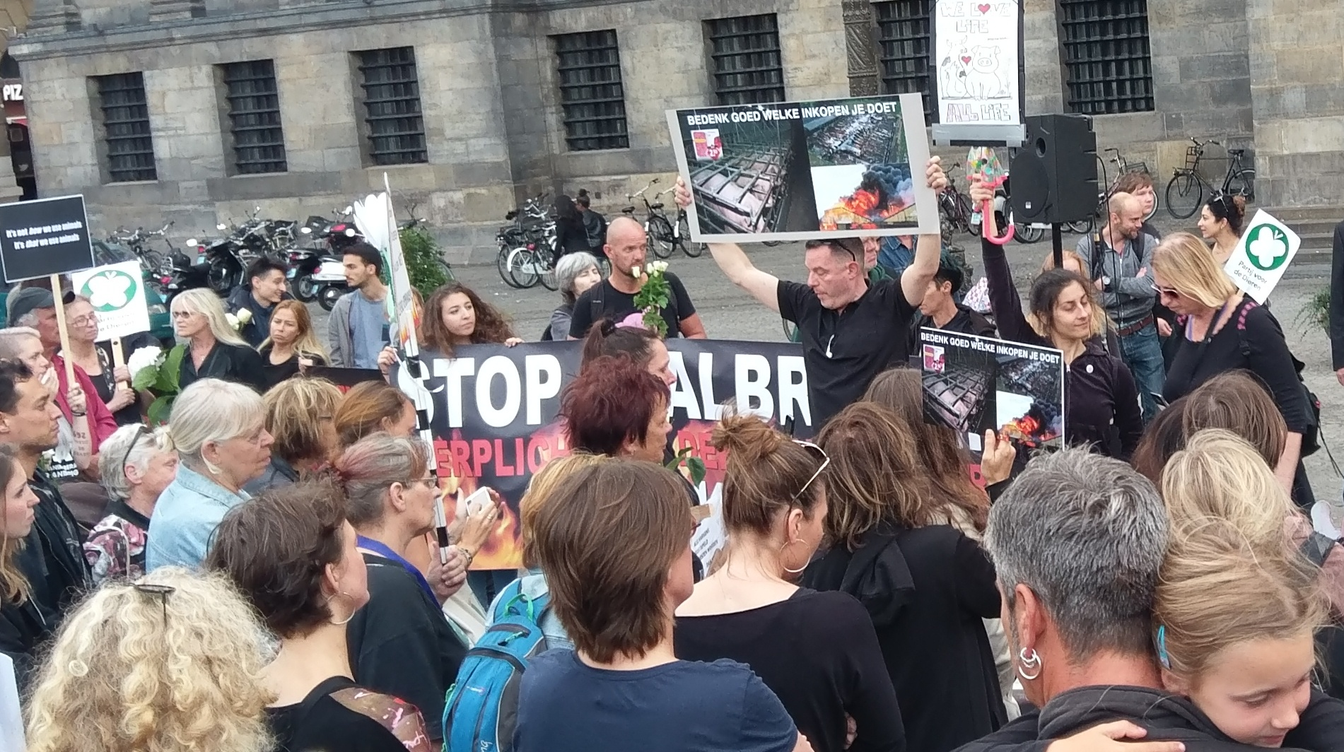 Stille mars voor dieren omgekomen in stalbranden, Amsterdam 25 augustus 2017 19.00. Het grote spandoek zegt: "Stop stalbranden. Verplicht brandmelders en sprinklers in elke stal." Het bord zegt "Bedenk goed welke inkopen je doet."